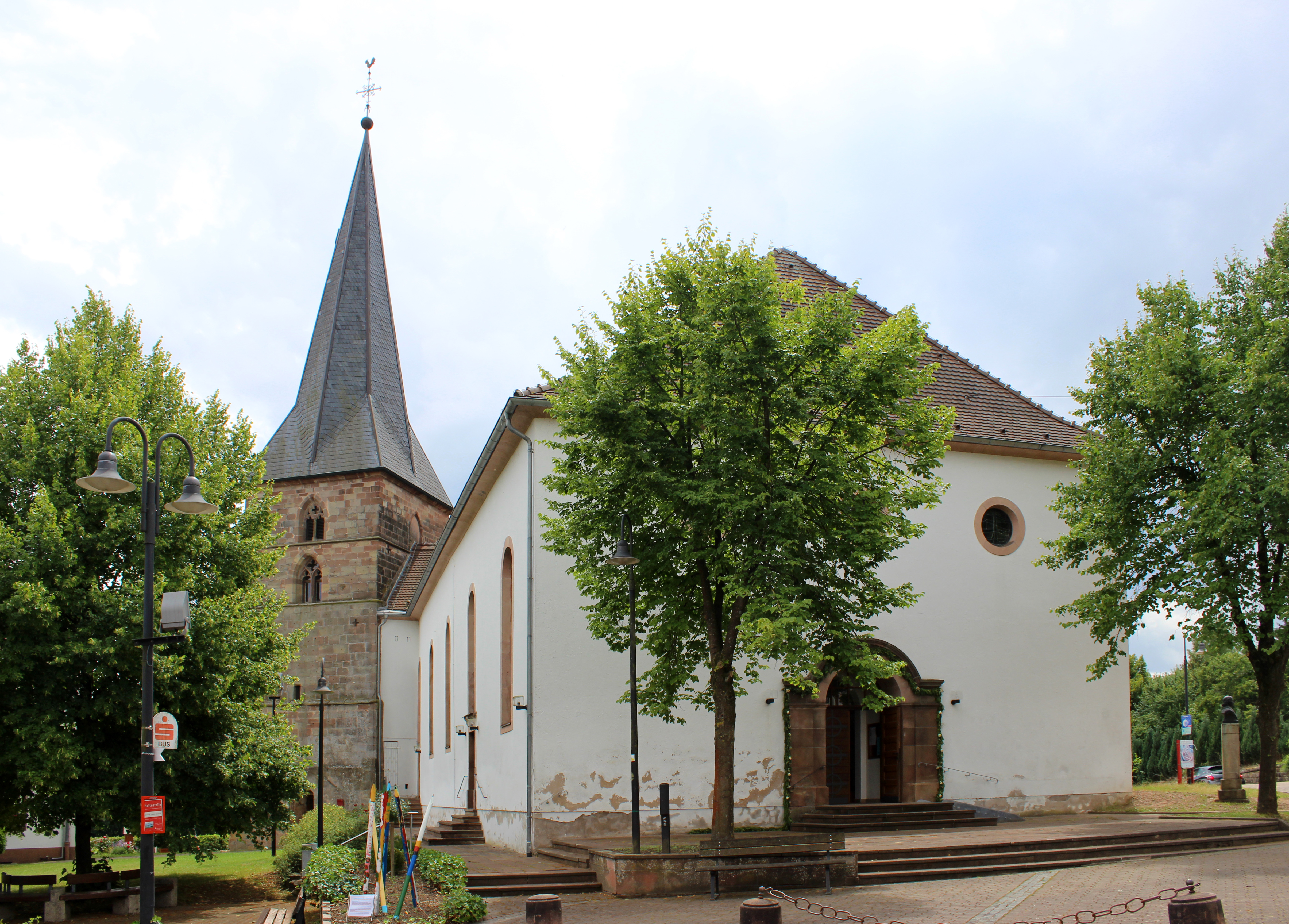 Die katholische Pfarrkirche St. Andreas in Altheim, einem Stadtteil von Blieskastel, Saarpfalz-Kreis, Saarland